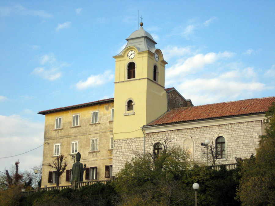 Kraljevica